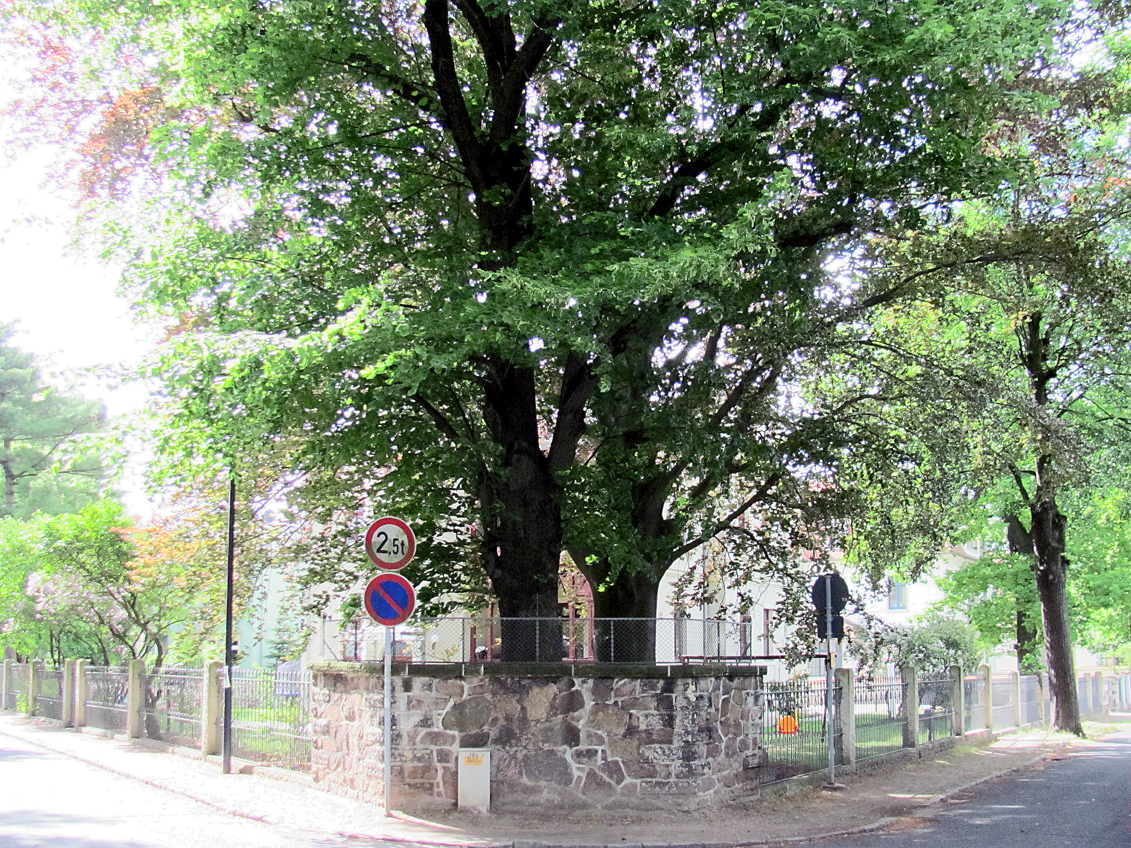 Radebeul-Niederlößnitz, Garten der Mietvilla Heinrich Emil Unger